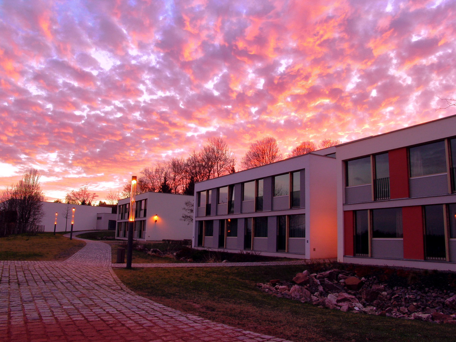 Sächsisches Landesgymnasium Sankt Afra (Meißen) – Blick auf das Mittelstufendorf und die Turnhalle (links hinten).